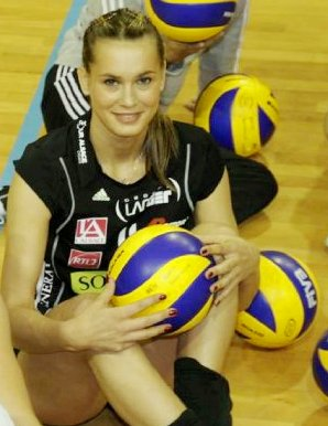 Joueuse française de volley-ball